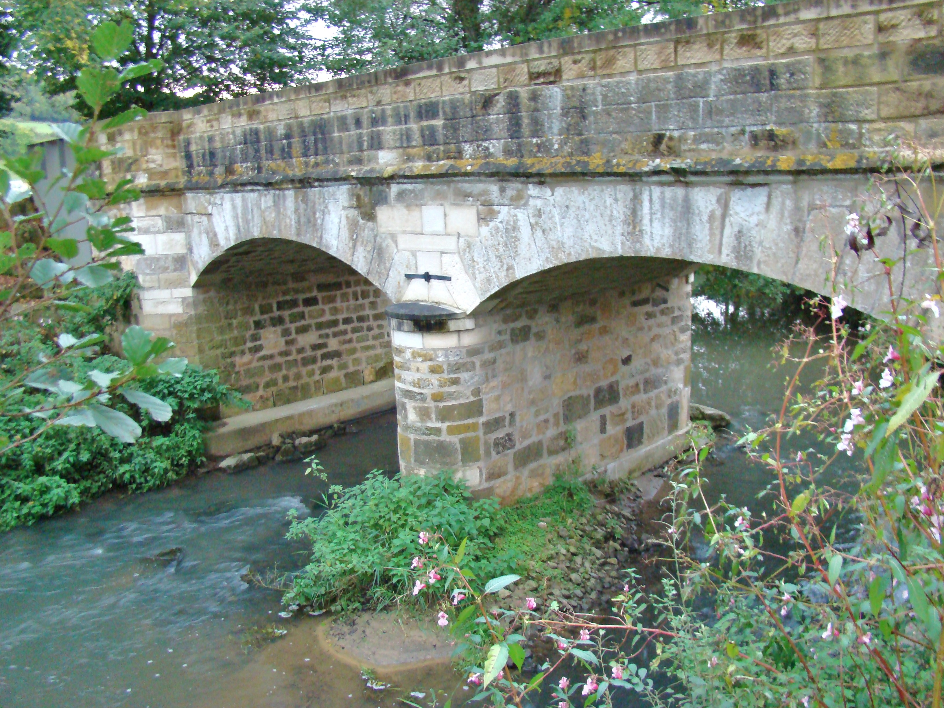 Ponceau du CR105B sur la rivière Eisch, ca. 500 m à l'ouest de AnsembourgLëtzebuergesch: Kleng Bréck vum CR105B iwwer d'Äisch ca. 500 m am Weste vun Aansebuerg